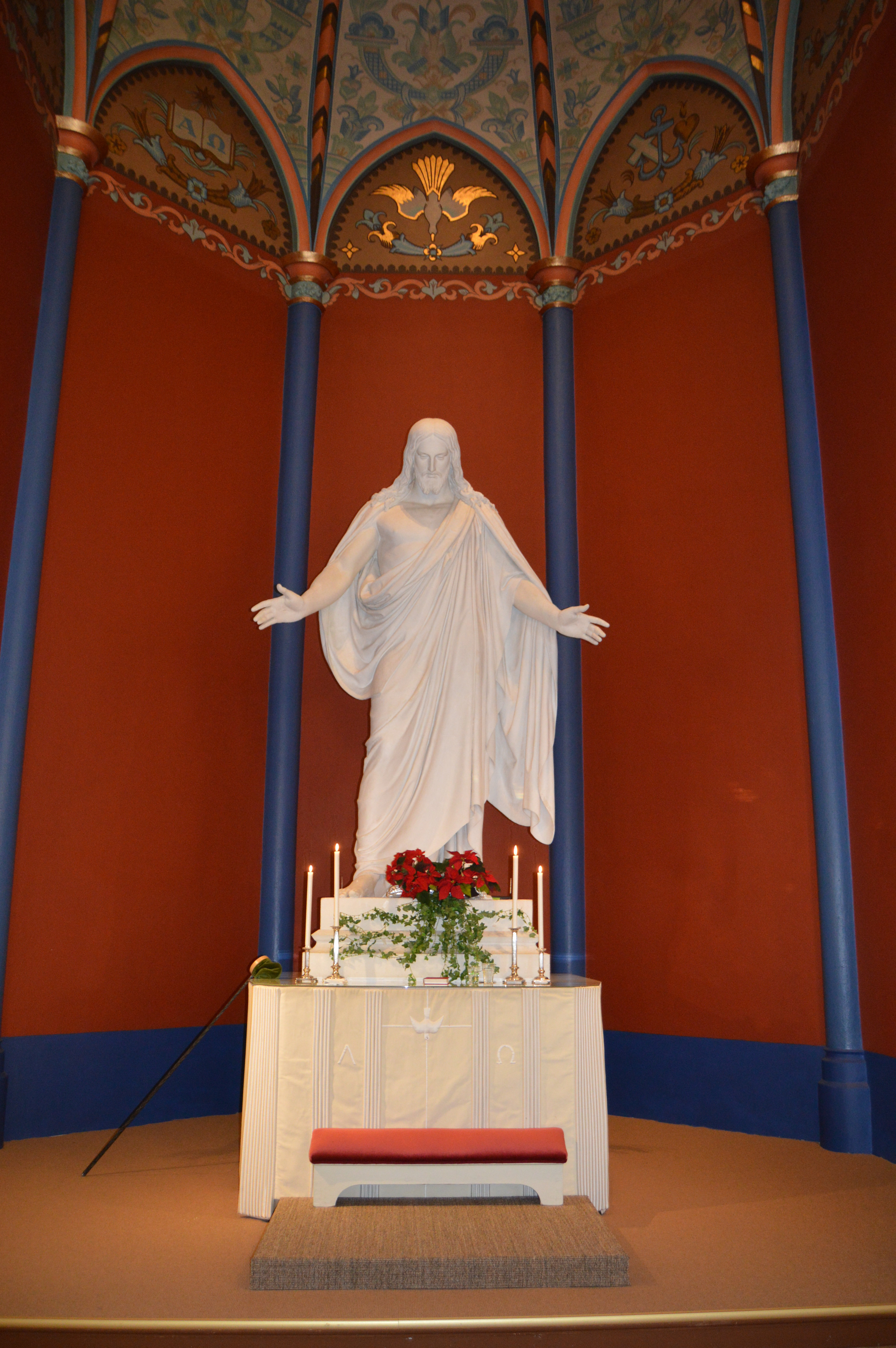 Loviisan kirkon alttari